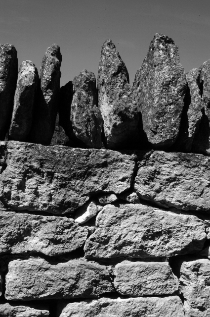 Style des murets à Gordes Photo de Christophe MOUSTIER - 2005